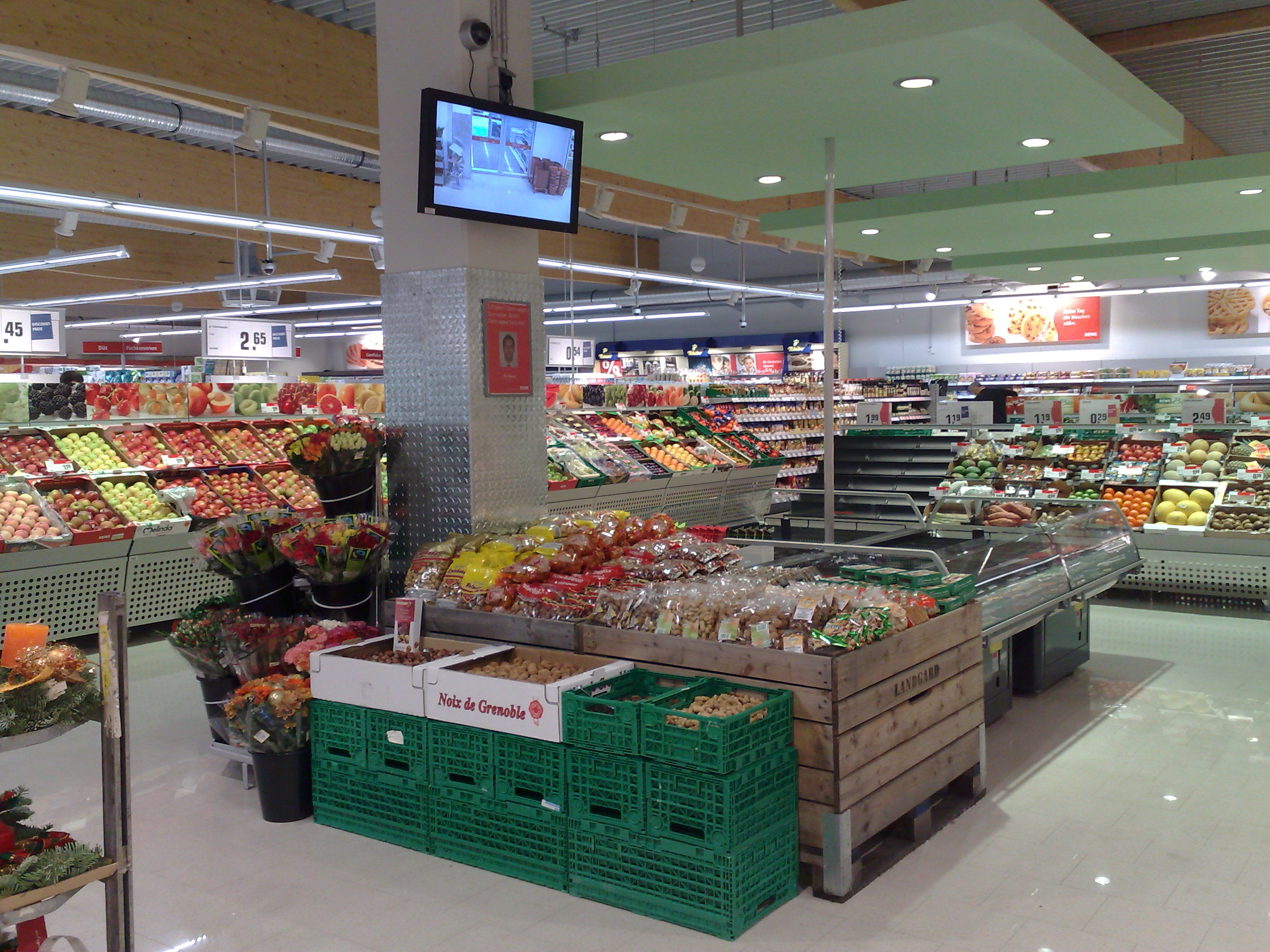 Obst- und Gemüseabteilung des neuen REWE-Markes in Aachen-Eilendorf.